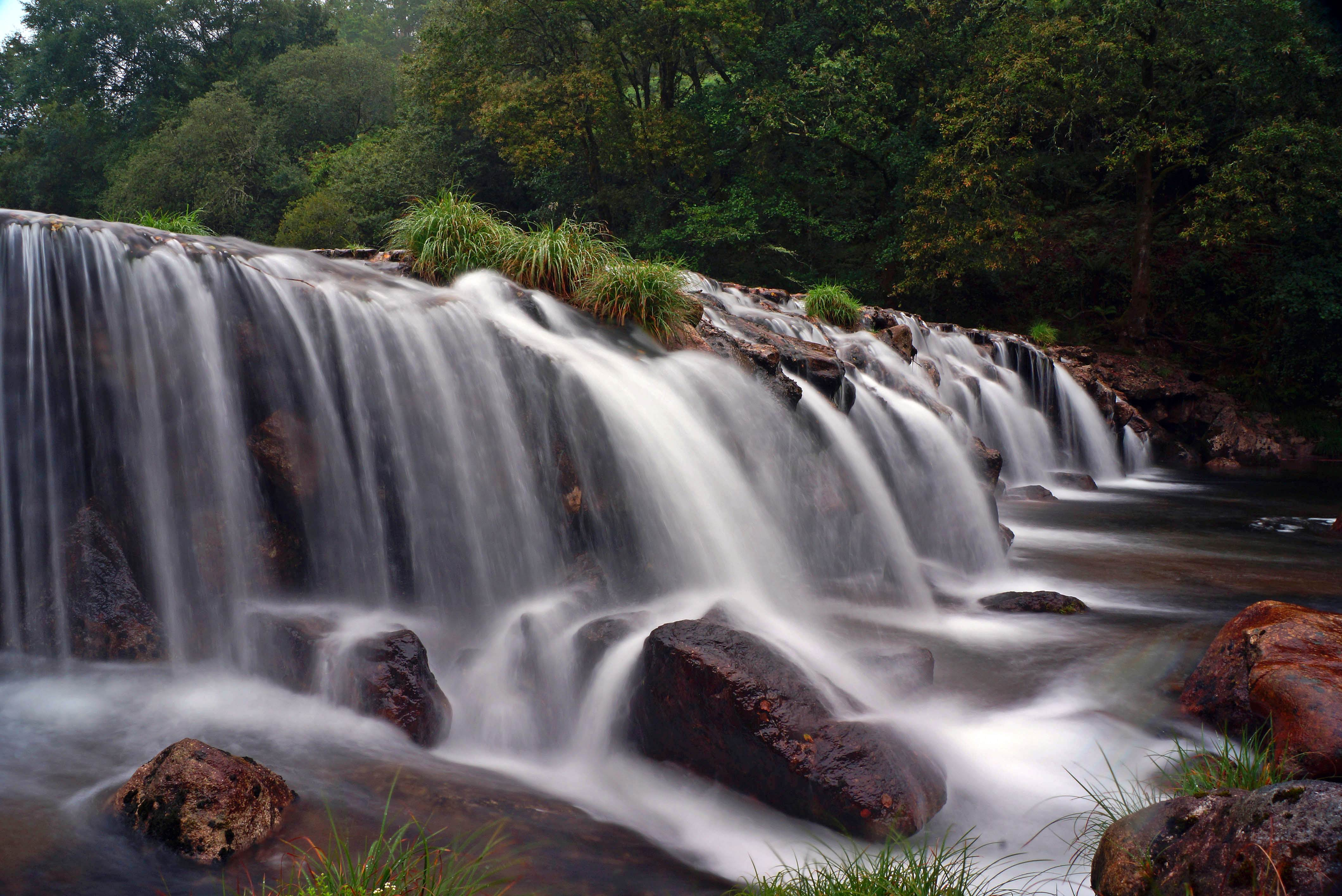 Río Tea